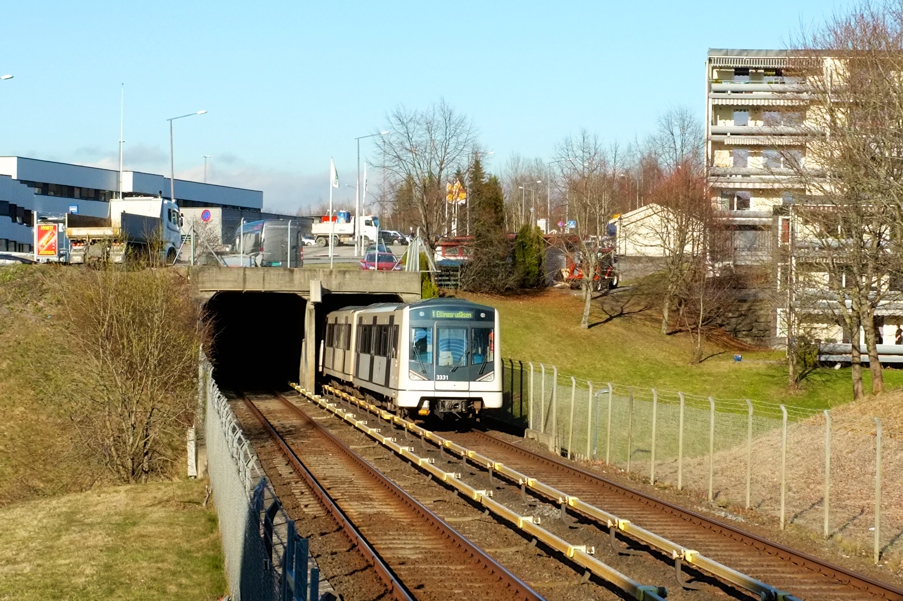 Linje 2 mellom Lindeberg og Furuset